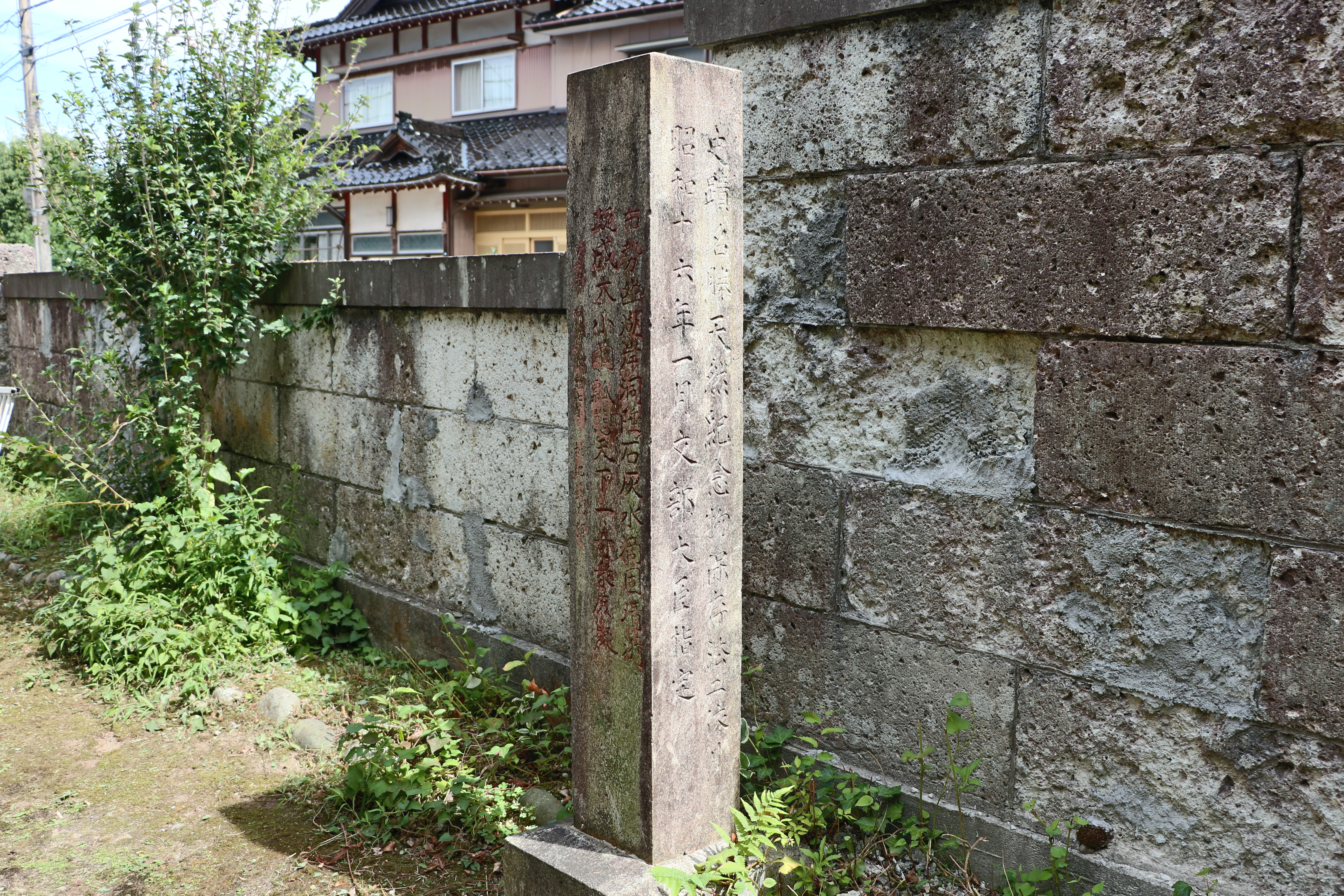 Stone monument in Ikubo no Hyotan-ishi, natural monument of Japan